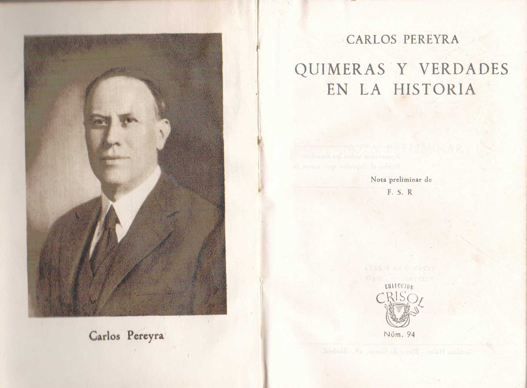 Frontispicio y título de la obra "Quimeras y verdades en la historia" de Carlos Pereyra. Publicada en 1945 en Madrid por la editorial M. Aguilar. Puede verse un retrato del autor.